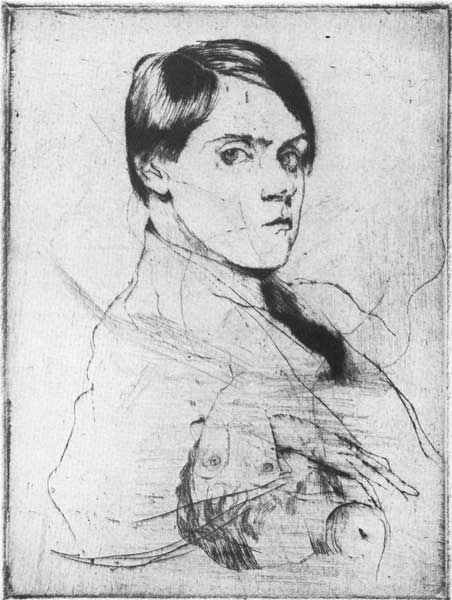 David Tägtström 1917 - porträtt i torrnål av Axell Fridell